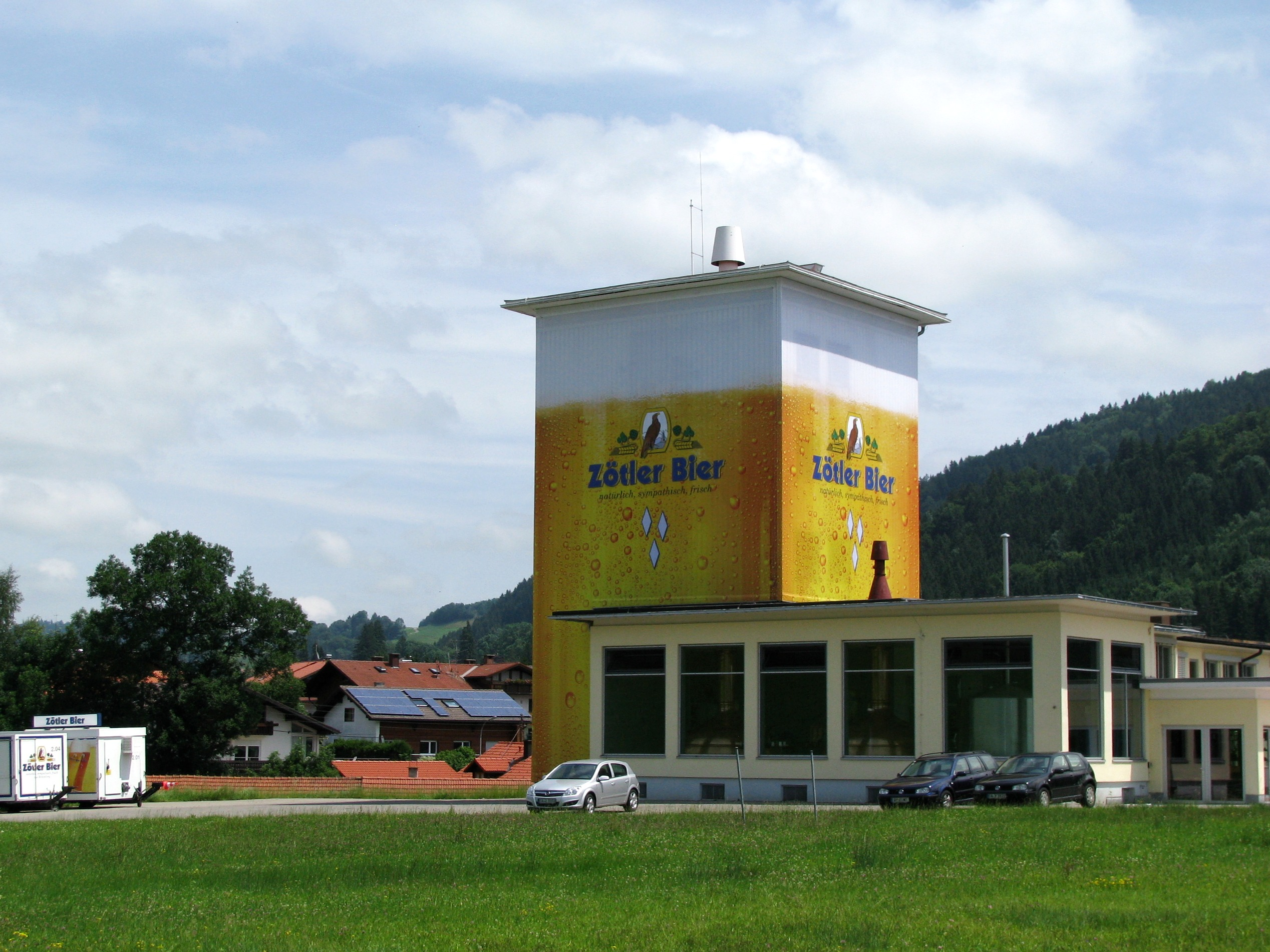 Eine von zwei Brauereien in Rettenberg.